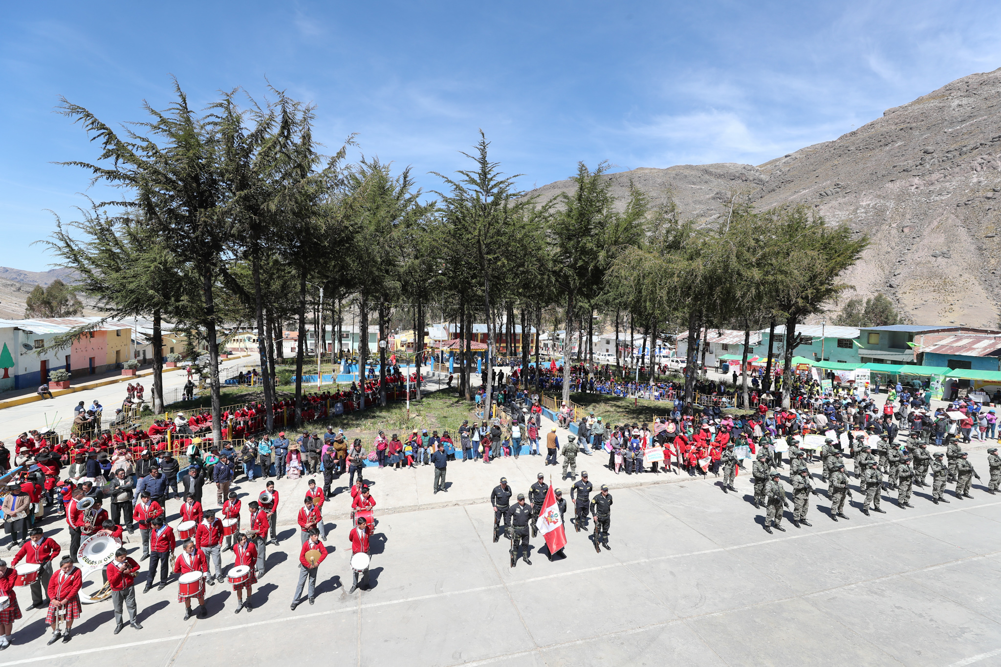 MINISTRO DE DEFENSA LLEVÓ AYUDA HUMANITARIA A CASTROVIRREYNA EN HUANCAVELICA